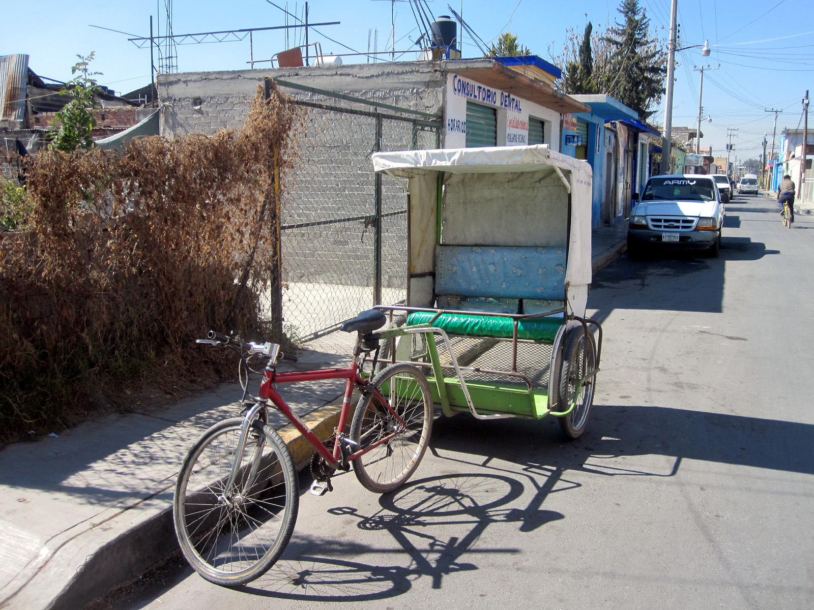 Sykkeldrosje i San Salvador Atenco i Atenco kommune i Mexico